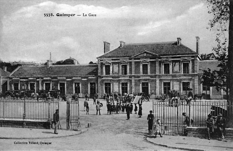 Le bâtiment voyageurs de la gare de Quimper au début des années 1900.